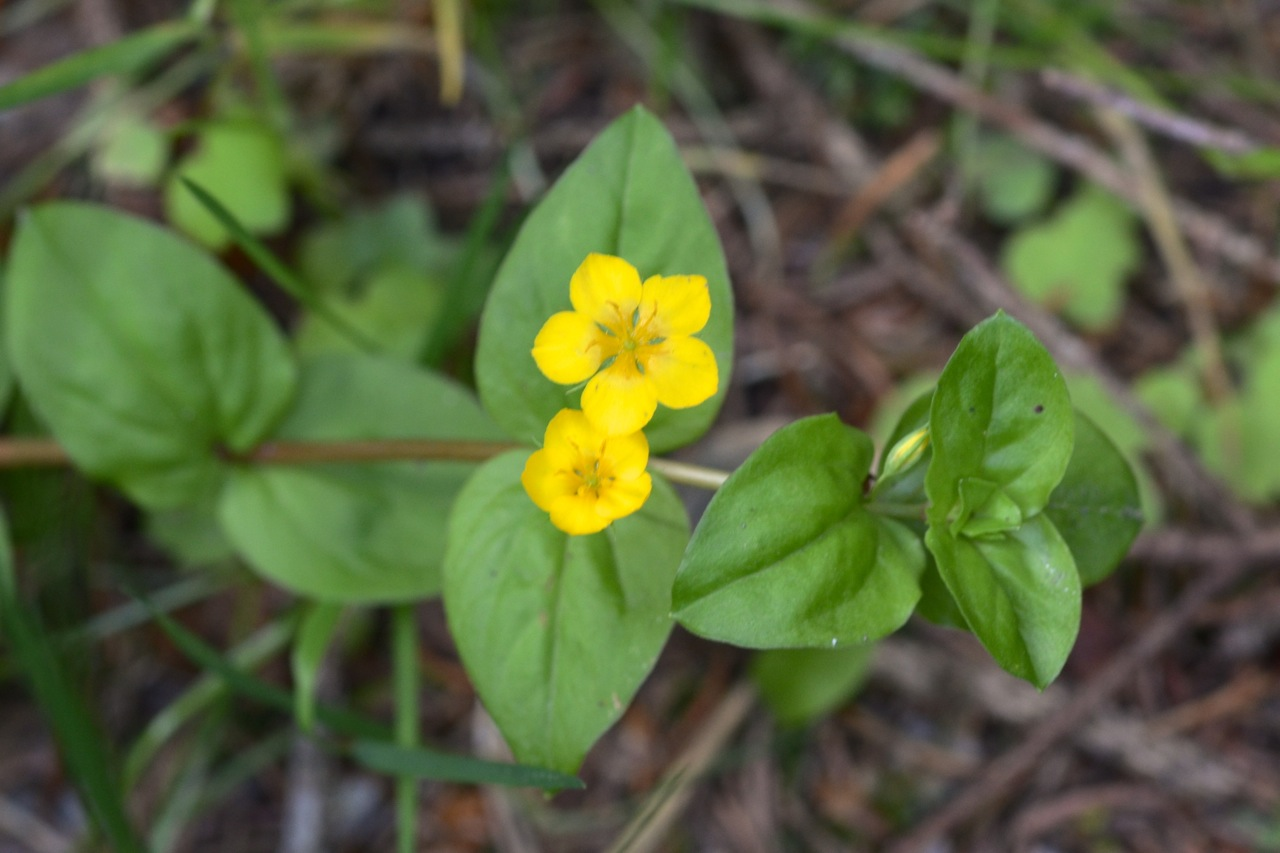 Lysimachia nemorum